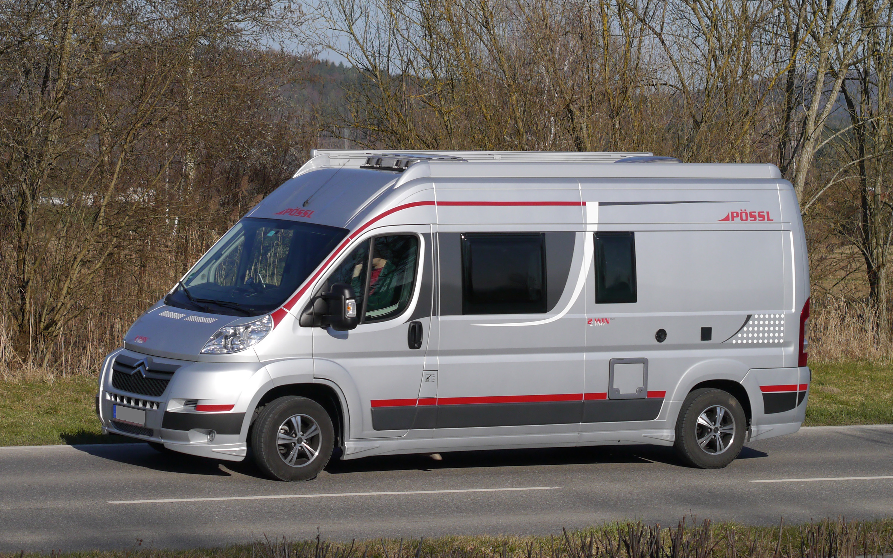 Citroen Jumper als Basis für Pössl 2Win-Wohnmobil